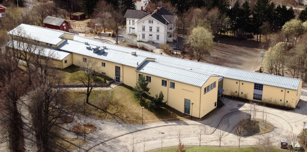 Nedre Bekkelaget skole